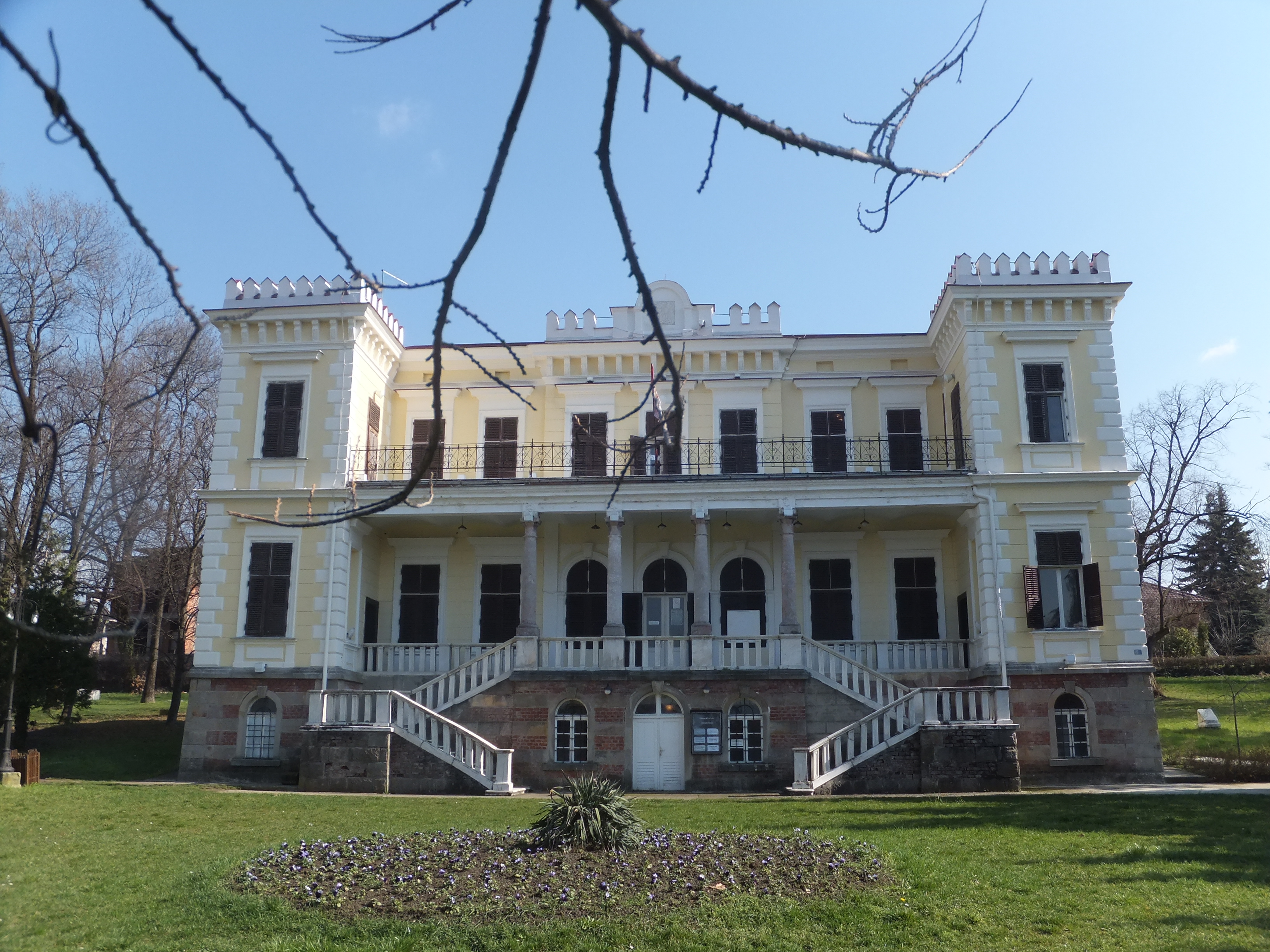 Дворац Белимарковића